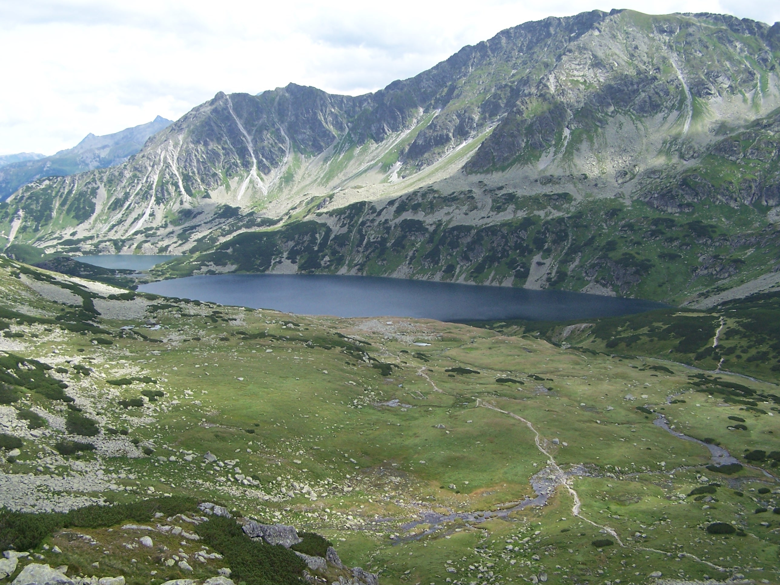 Dolina Pięciu Stawów Polskich